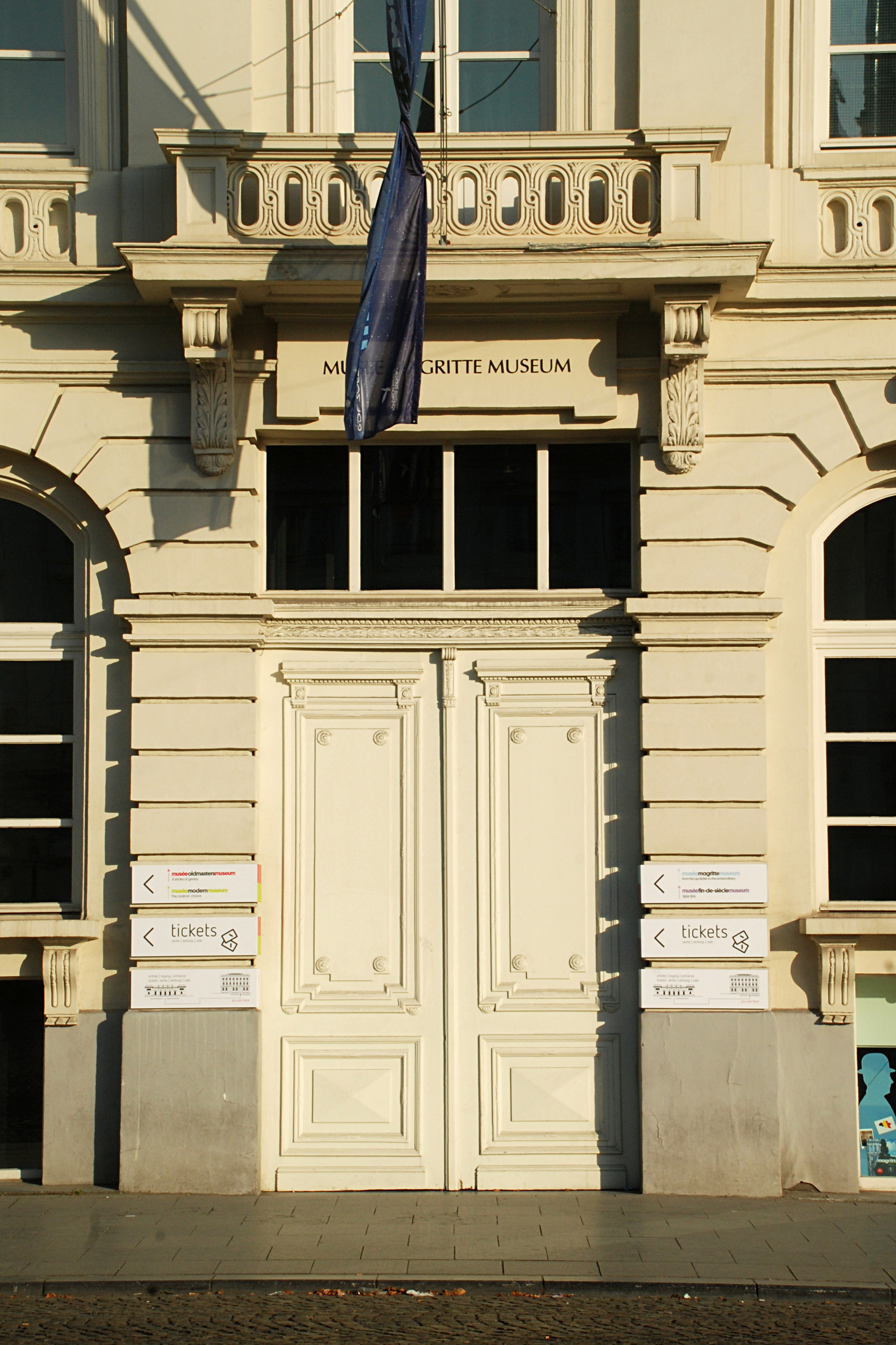 Belgique - Bruxelles - Place Royale - Hôtel du Lotto